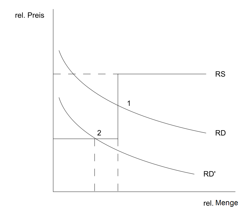 Das allg. Weltmarktgleichgewicht